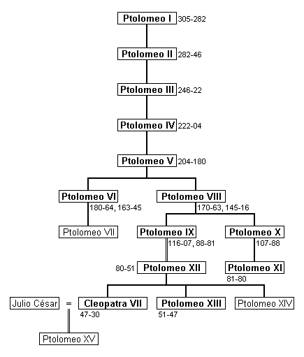 Árbol genealógico de los reyes de Egipto de la dinastía lágida o ptolemaica.